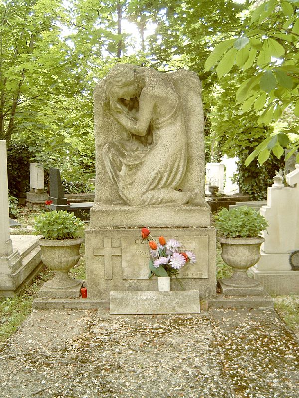 Czimra Gyula (Budapest, 1901. január 3.–Budapest, 1966. július 16.) festő sírja Budapesten. Új köztemető: 92-1-61/62